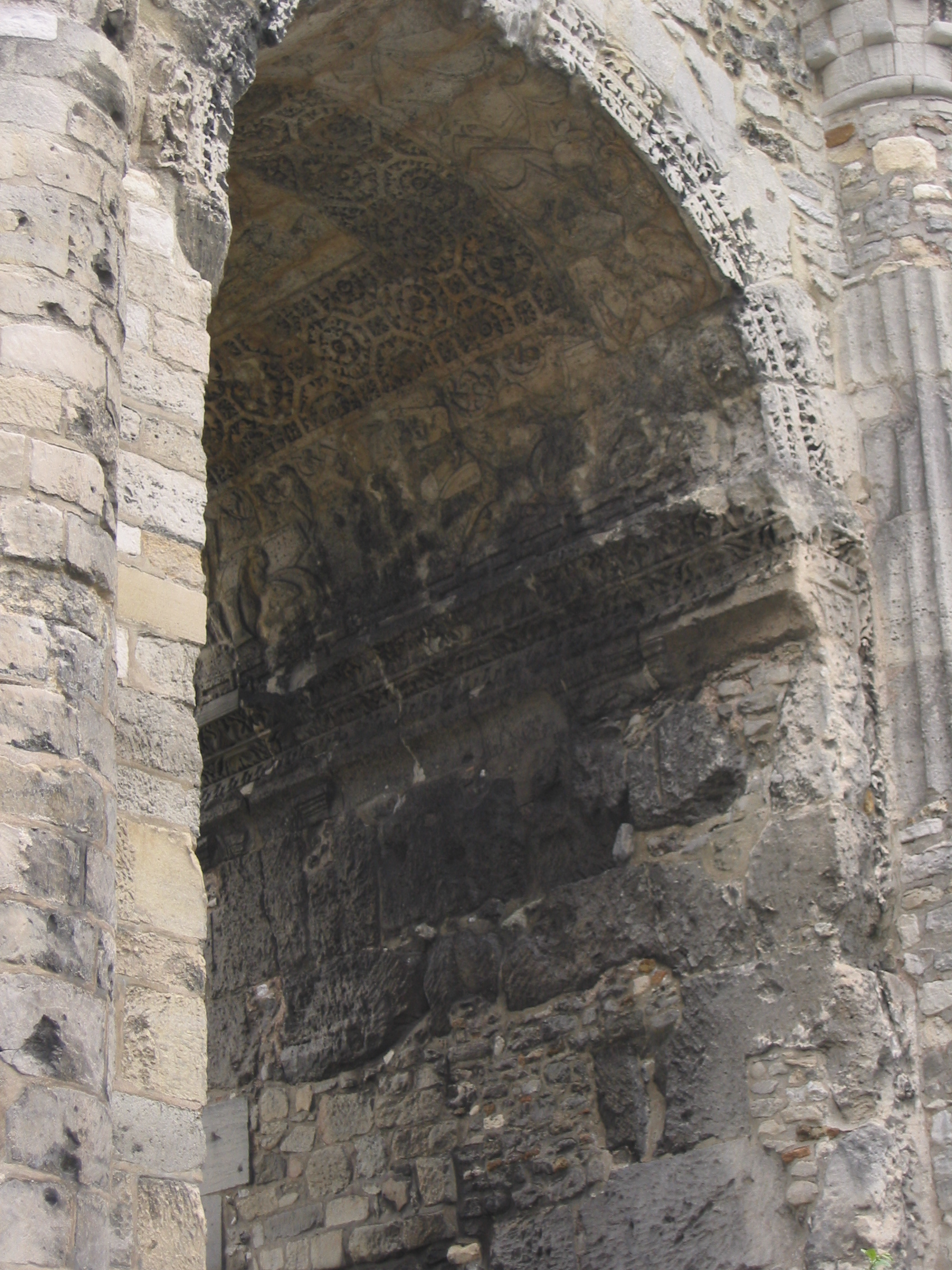 Reims, France.